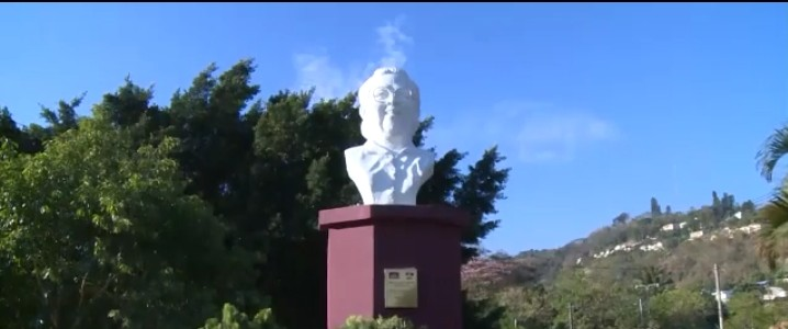 Busto de Mélida Anaya mejor conosida como la comandante Ana Maria, San Salvador